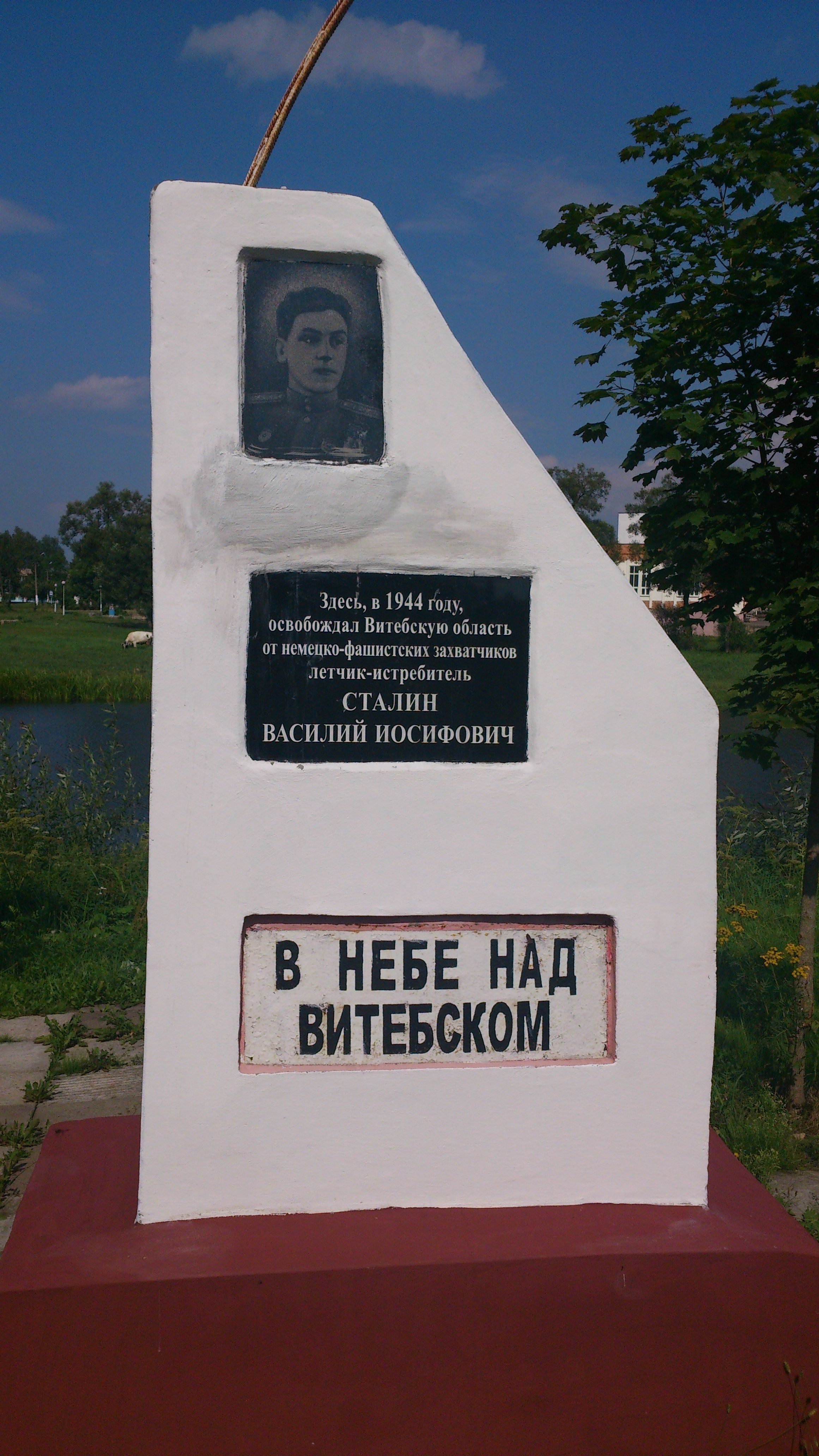 Памятный знак Сталину В.И. (сыну Иосифа Сталина) в агрогородке Копти